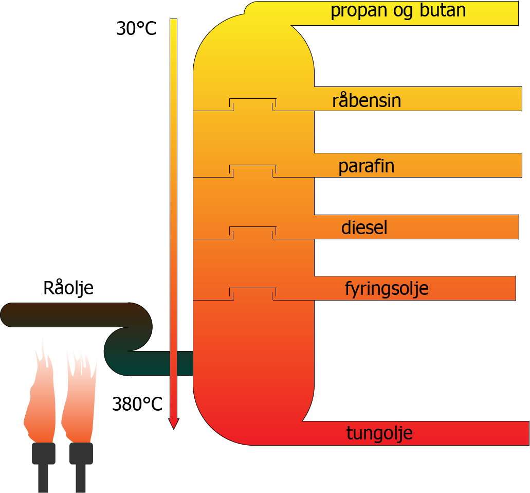 Destillasjonstårn for raffinering av råolje.